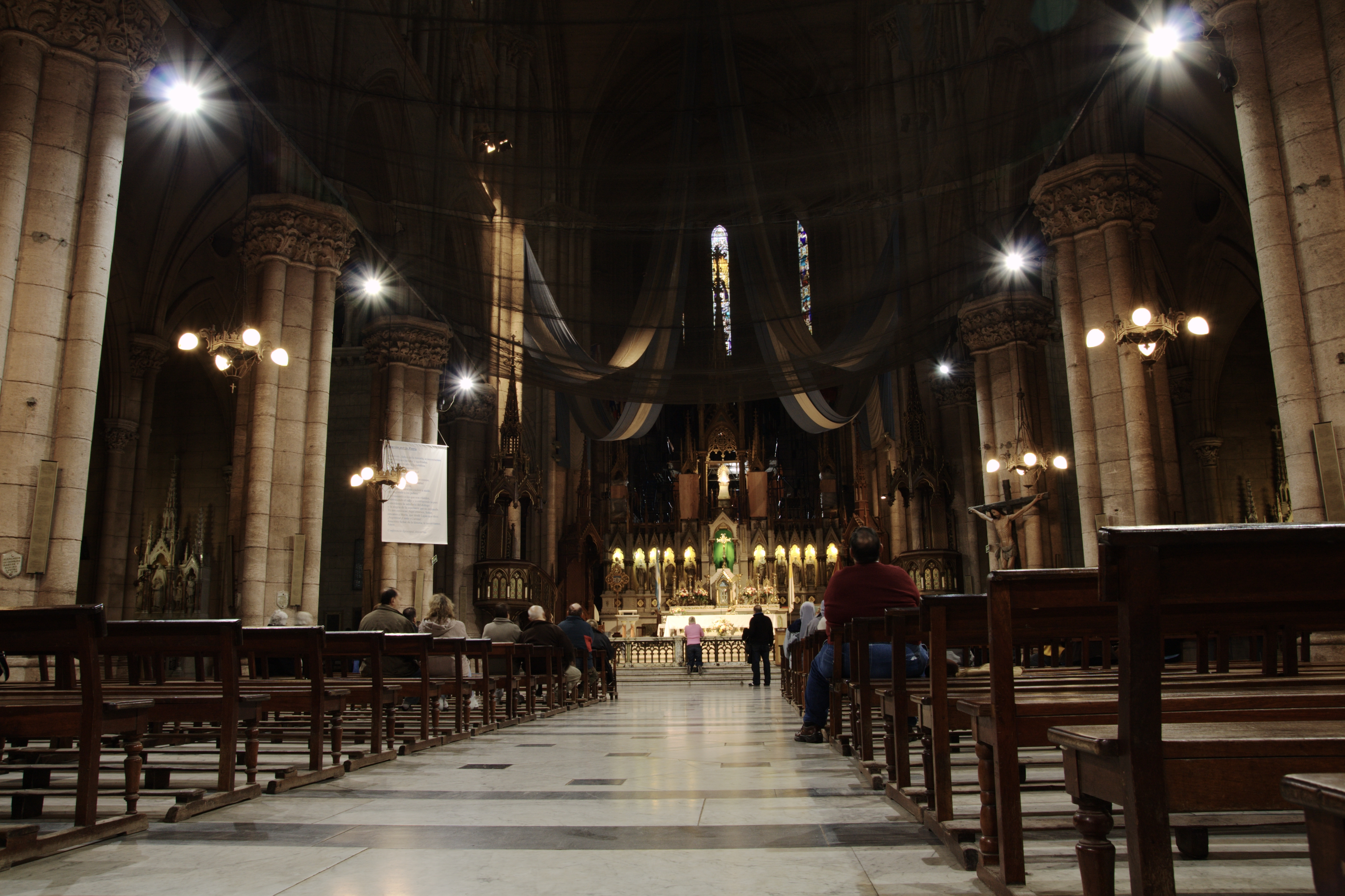 Basílica de Nuestra Señora de Luján, Luján, provincia de Buenos Aires, Argentina.